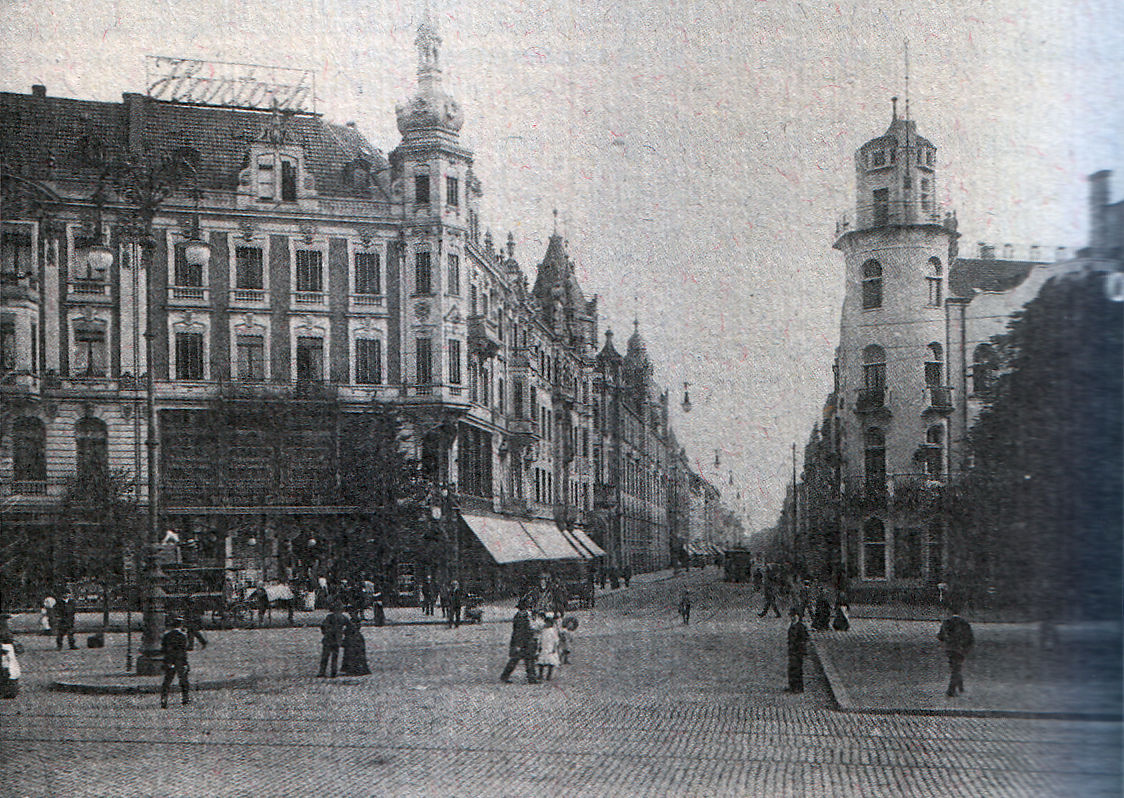 Düsseldorf, Friedrichstraße, nach 1900. Bildunterschrift: Blick vom Graf-Adolf-Platz in die Friedrichstraße: auf diesem Foto (nach 1900) sind auch zwei Türmchen der „Klebekiste“ [Landesversicherungsanstalt Rheinprovinz] zu erkennen (Hintergrund Bildmitte). Links im Bild die erste Zweigstelle des Warenhaus der Gebe. Hartoch, Friedrichstraße Nr. 2.